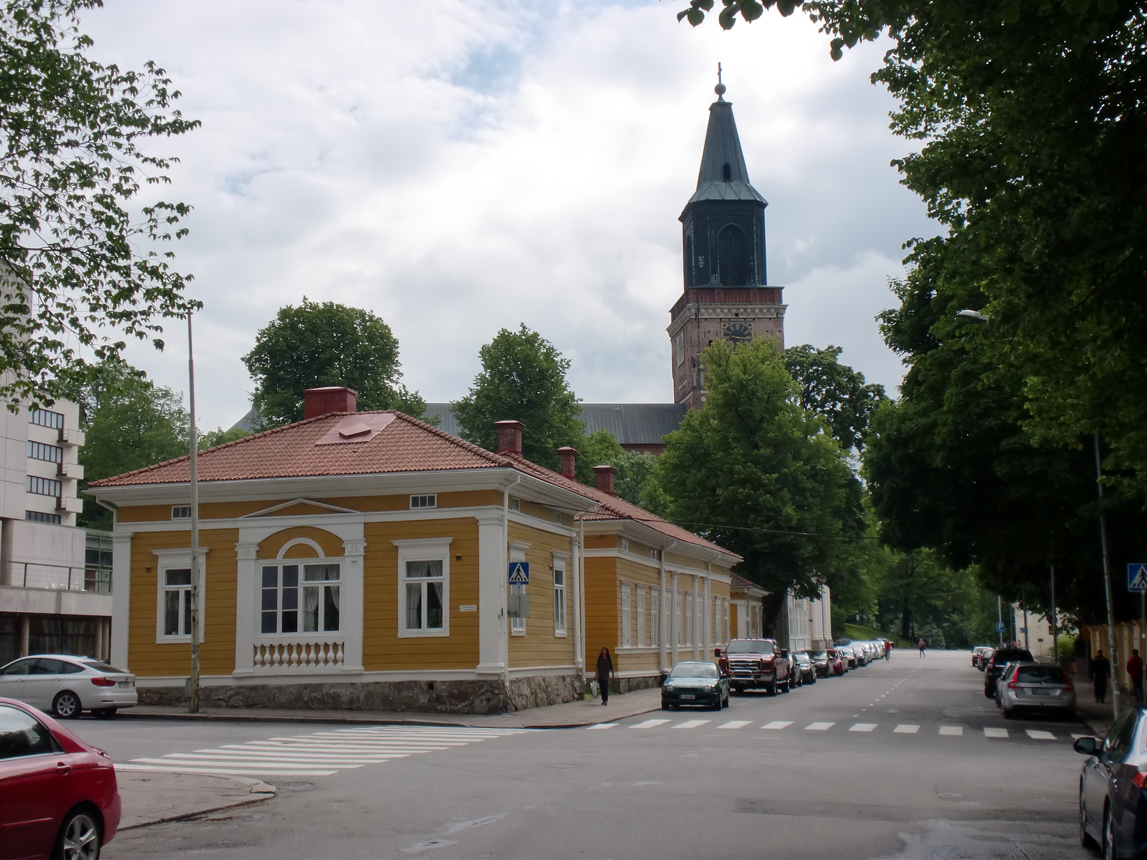 Ett Hem; museo